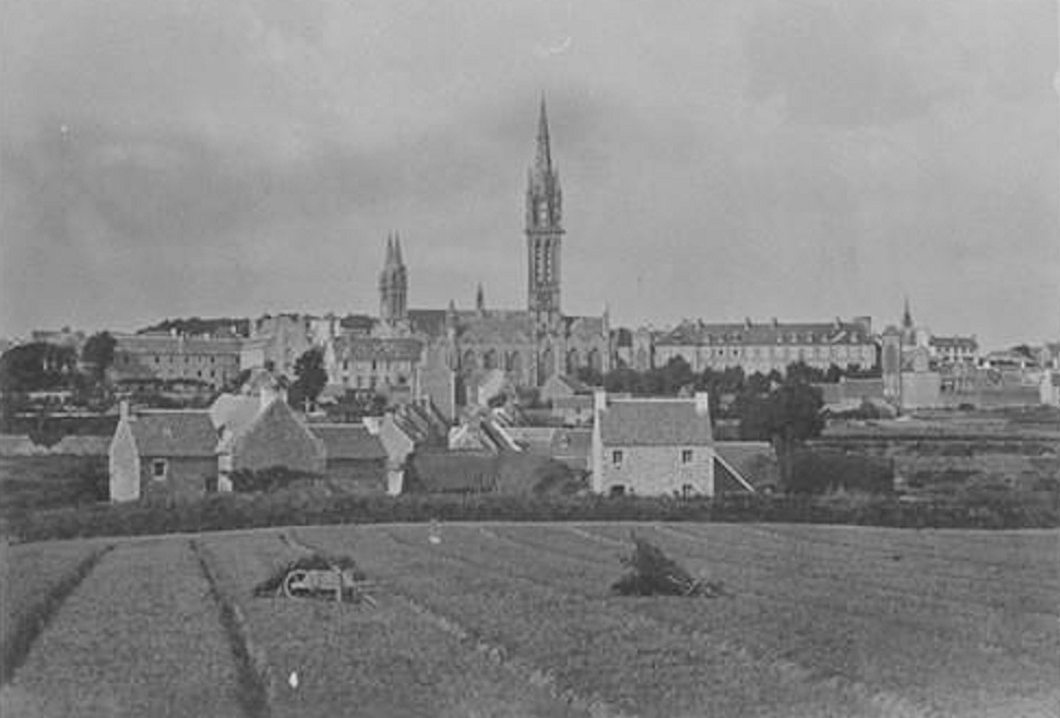 Saint-Pol-de-Léon : la ville et le Kreisker en 1873 (J. Duclos